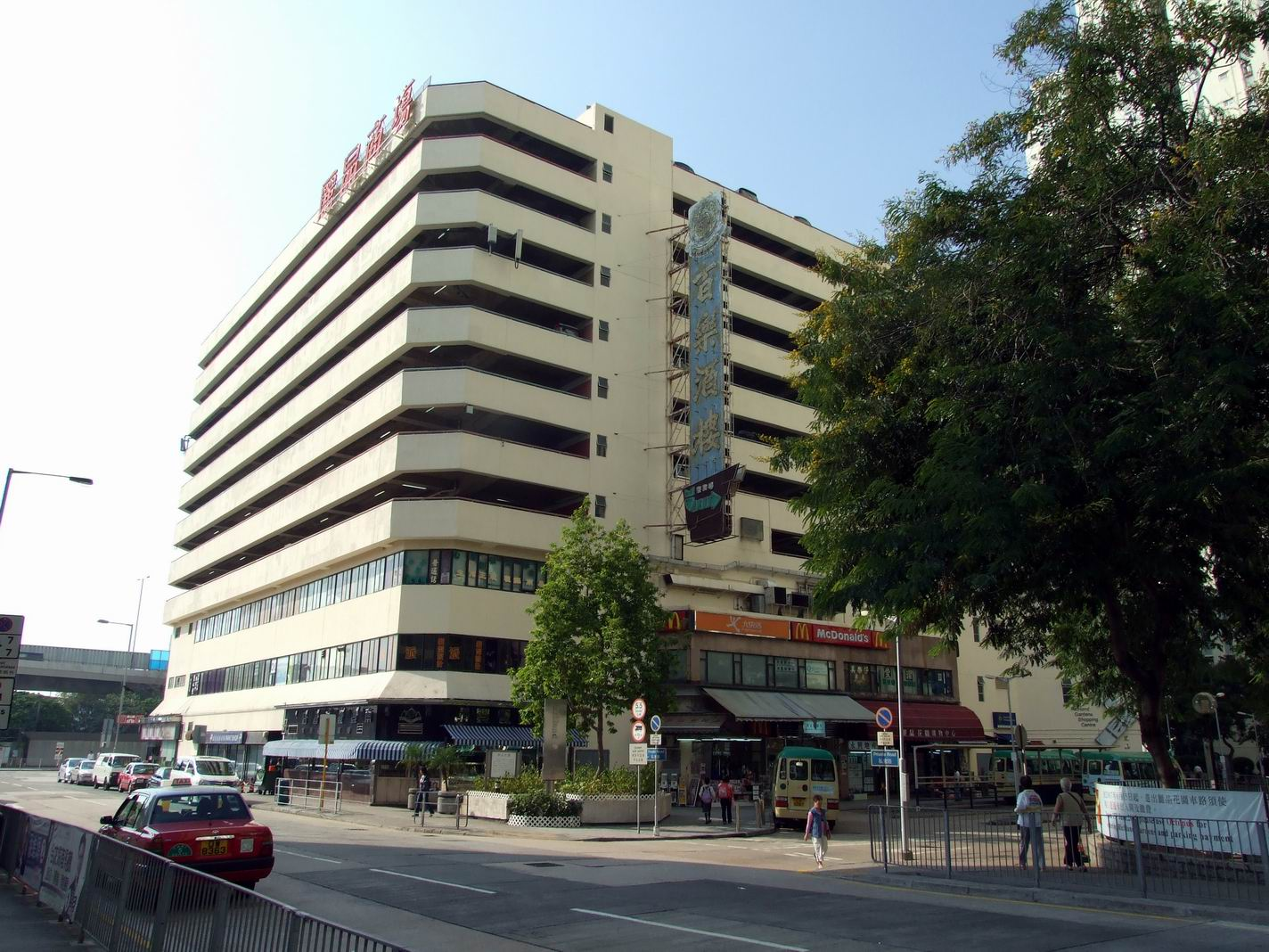 麗晶商場